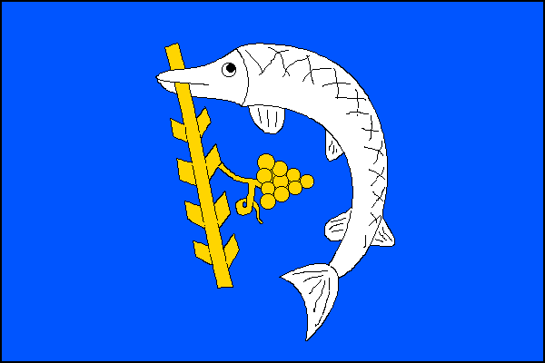 vlajka obce Nedachlebice